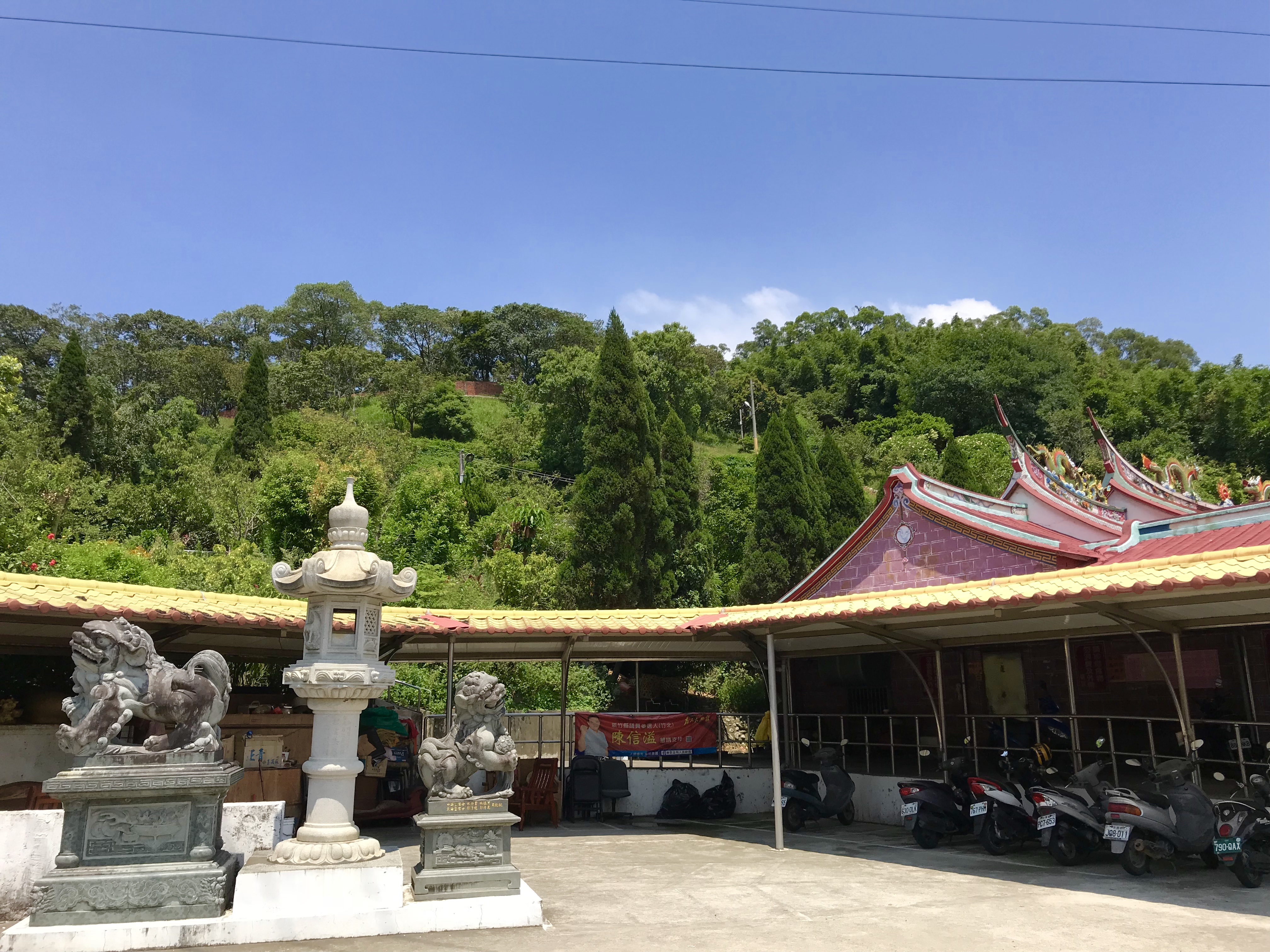 竹北蓮華寺石獅